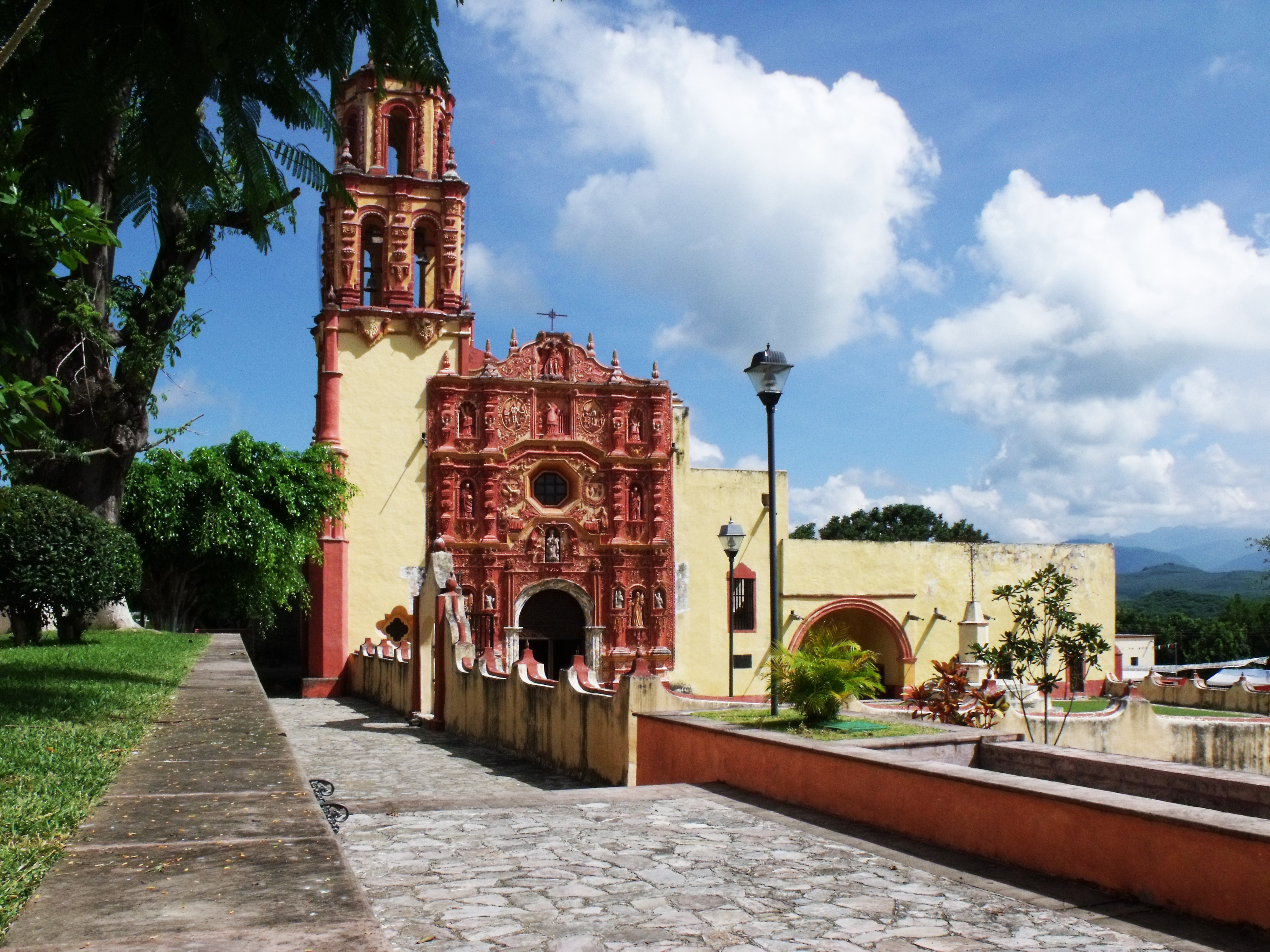 Misión de Landa de Matamoros